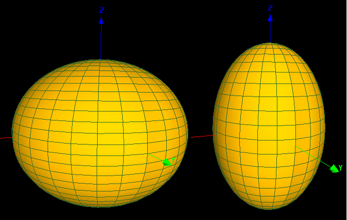 στερεά από περιστροφή έλλειψης